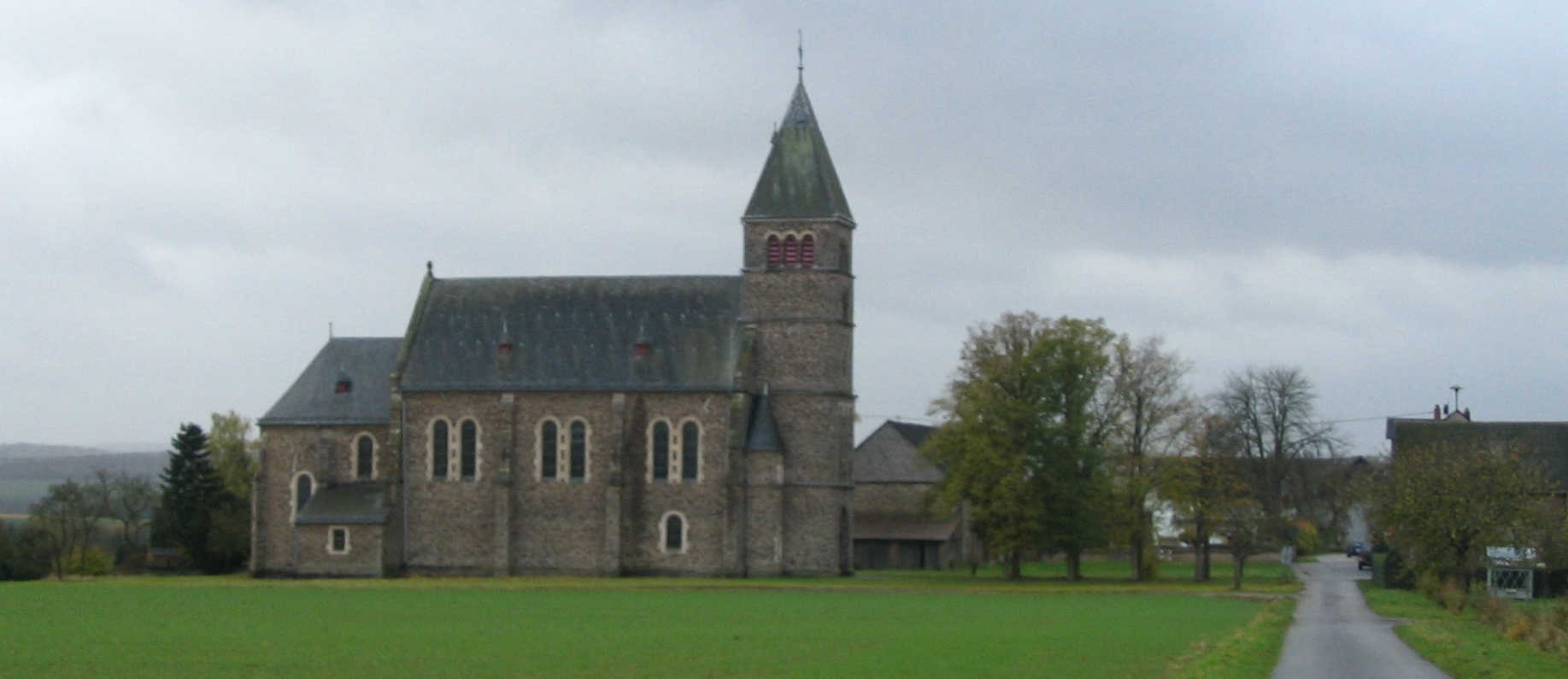 Kirche St. Maria Magdalena auf dem Petershäuser Hof zwischen Zilshausen und Lahr im Hunsrück